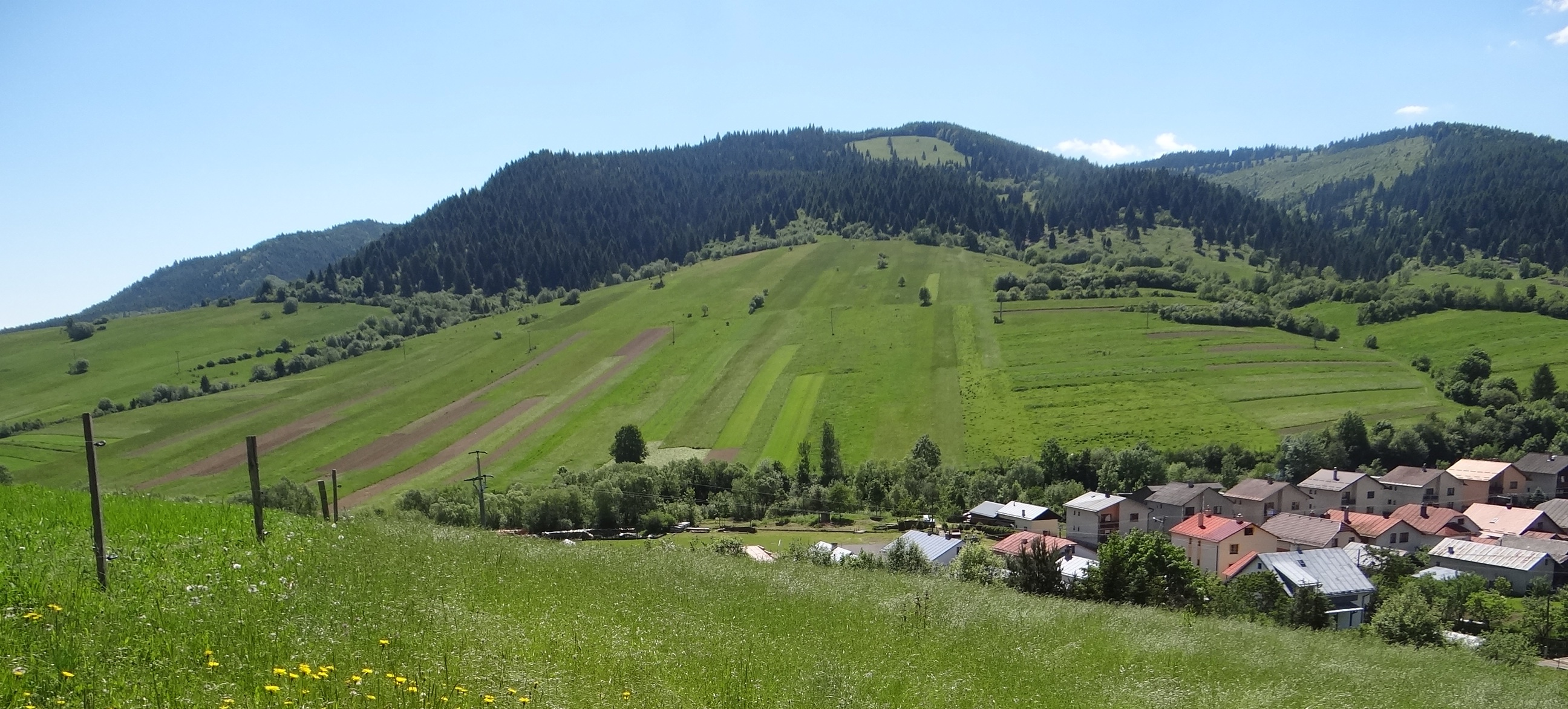 Od lewej: Borsučinky, Sihla i Predné hory. W dole miejscowość Kołaczków (Kolačkov)